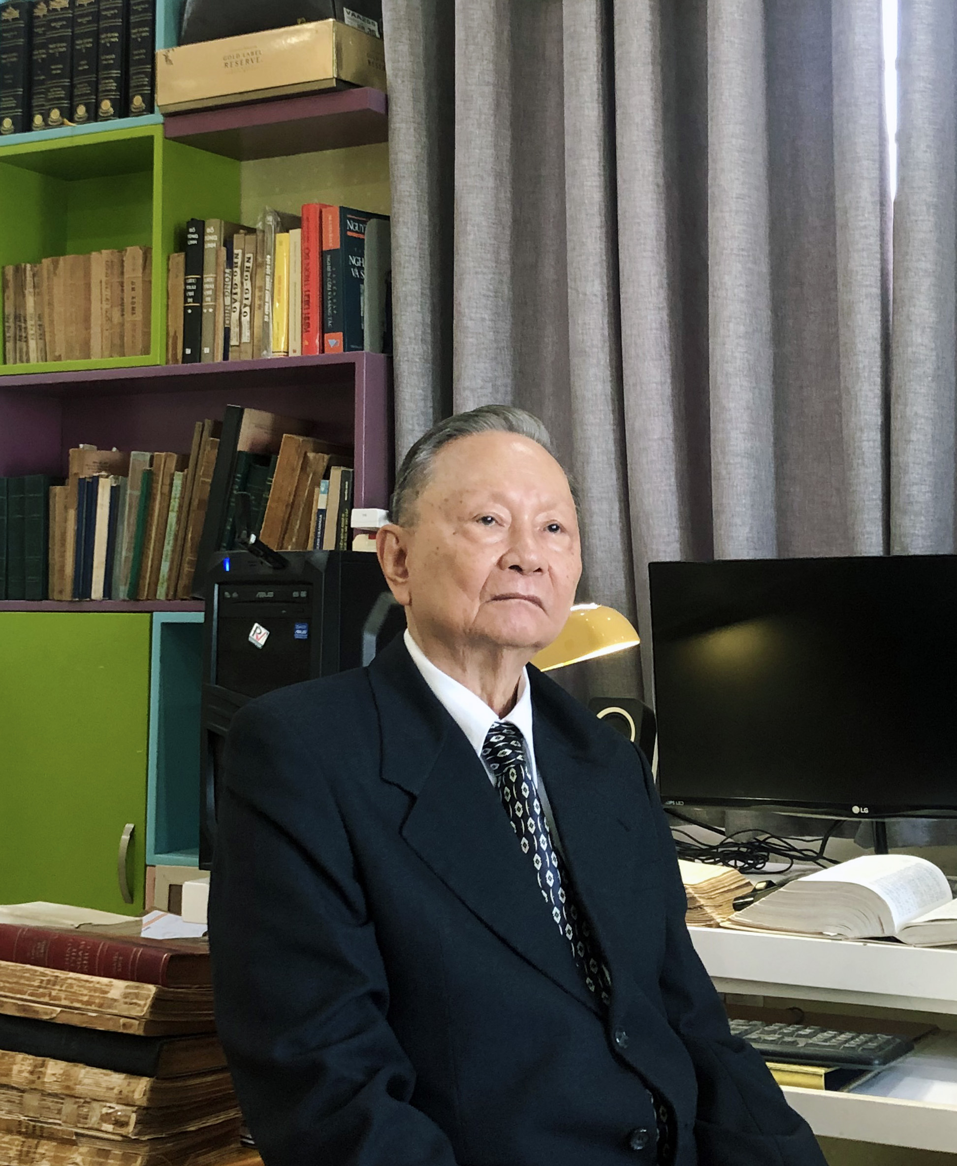 Giáo sư Nguyễn Khuê bên bàn làm việc tại nhà riêng 2020